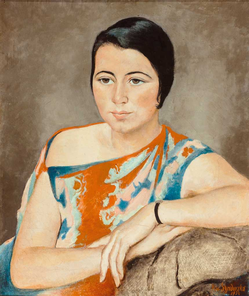 Portrait der Helga Schlegel, Tochter des Bregenzer Fotografen Werner Schlegel. Öl/Lwd. (Craquelé). Ca. 59,5 x 50 cm